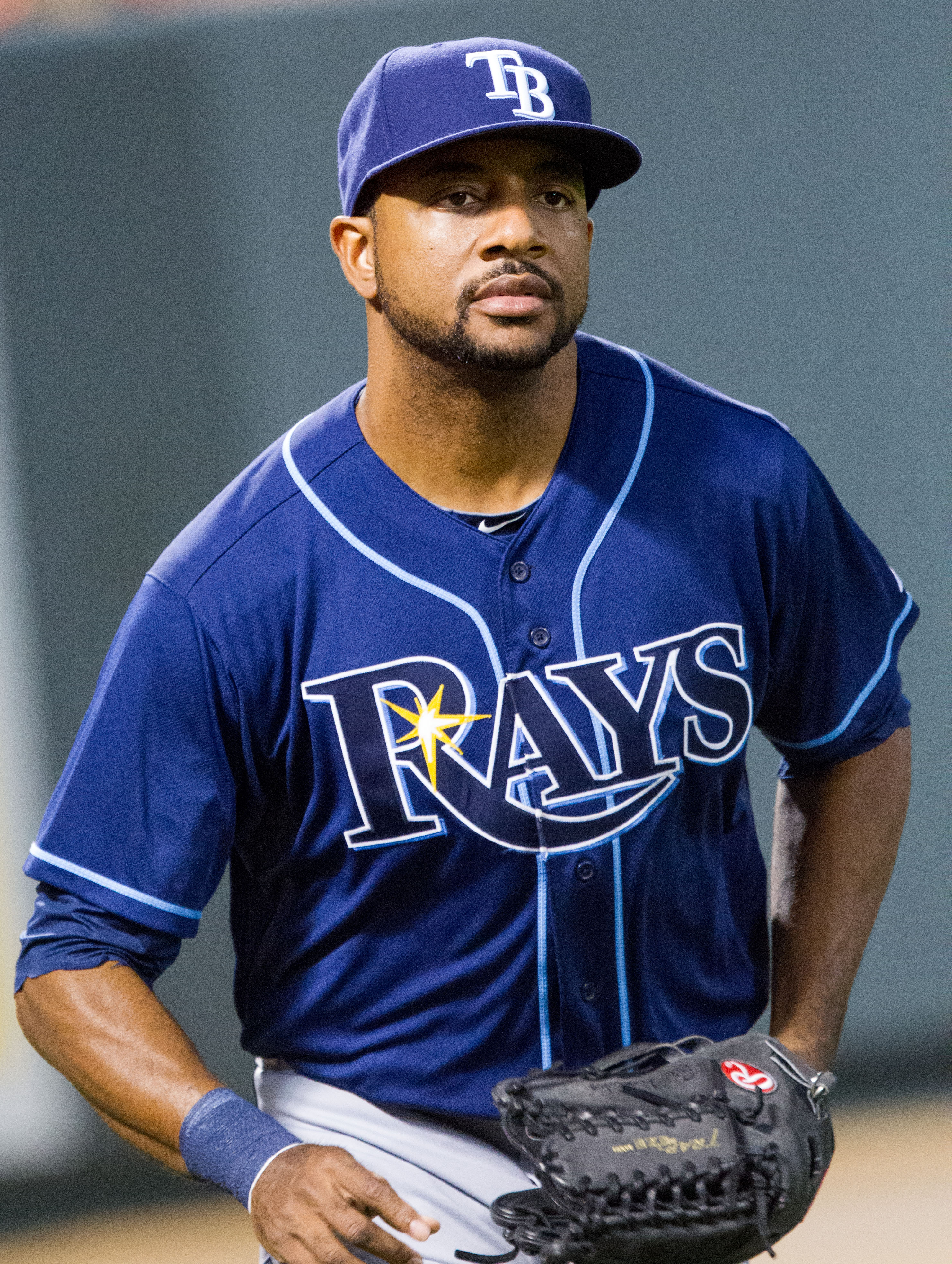 Ben Francisco